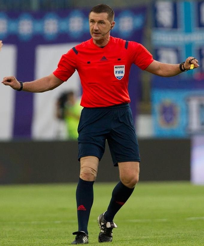 Юрій Можаровський - український футбольний арбітр